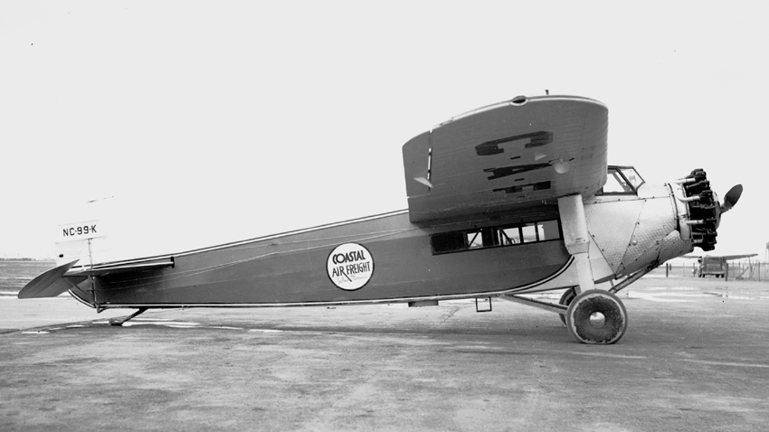 FokkerSUCoastalAF37